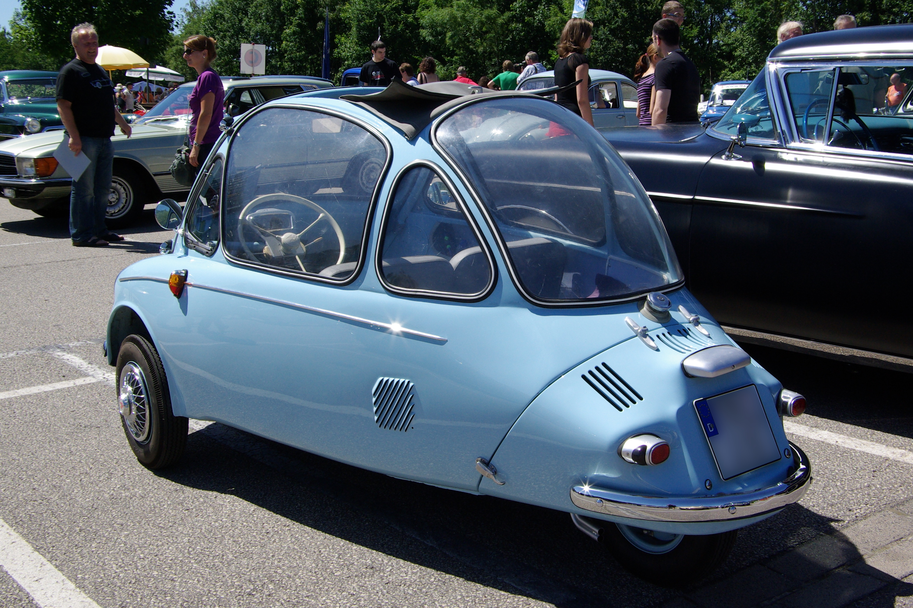 Heinkel/Trojan 153, Baujahr 1961, 10 PSaufgenommen bei / photographed at "Internationales Konzer Oldtimer-Treffen", 18. Juli 2010